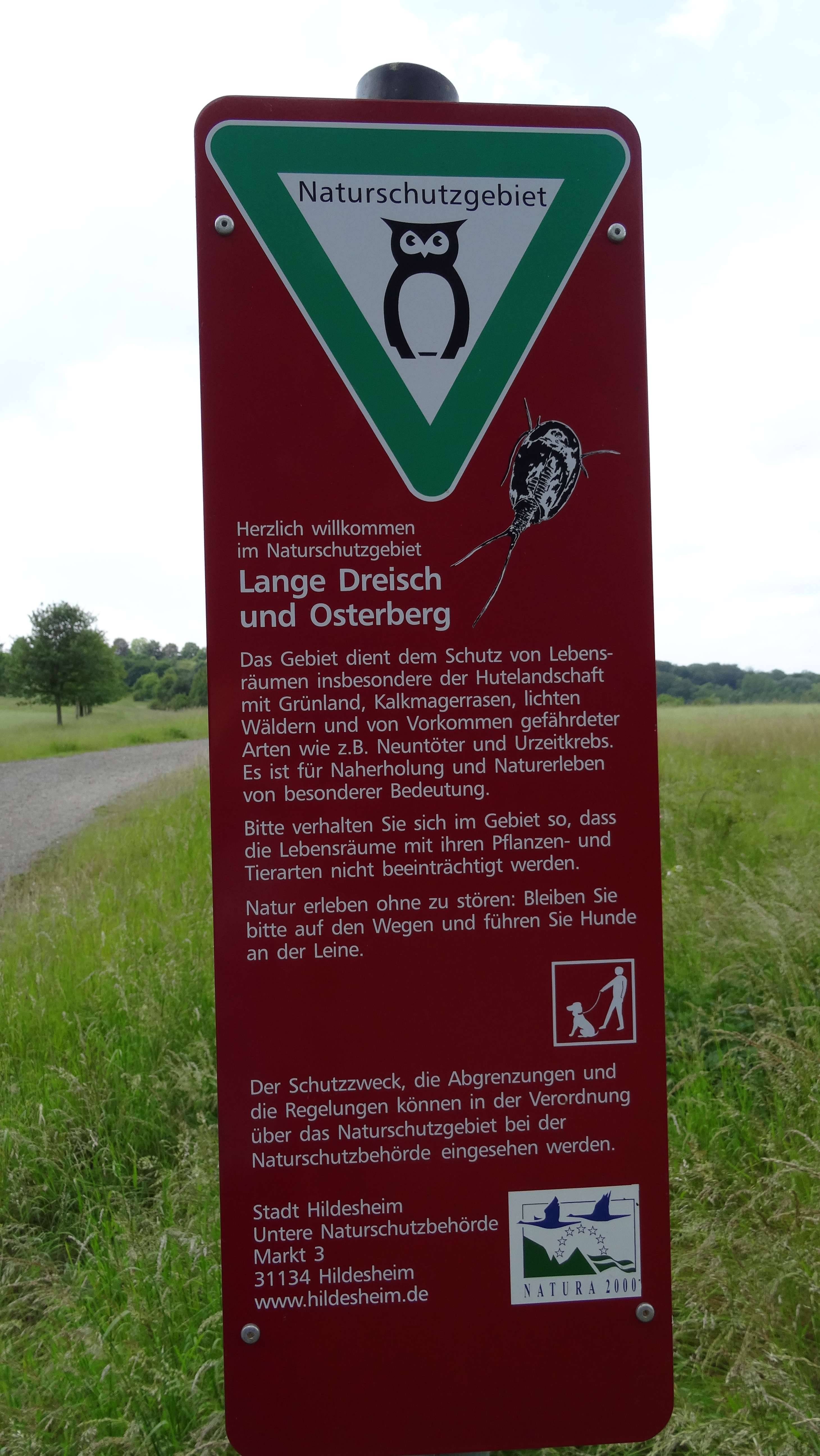 Schild des Naturschutzgebietes Lange Dreisch und Osterberg, Hildesheim